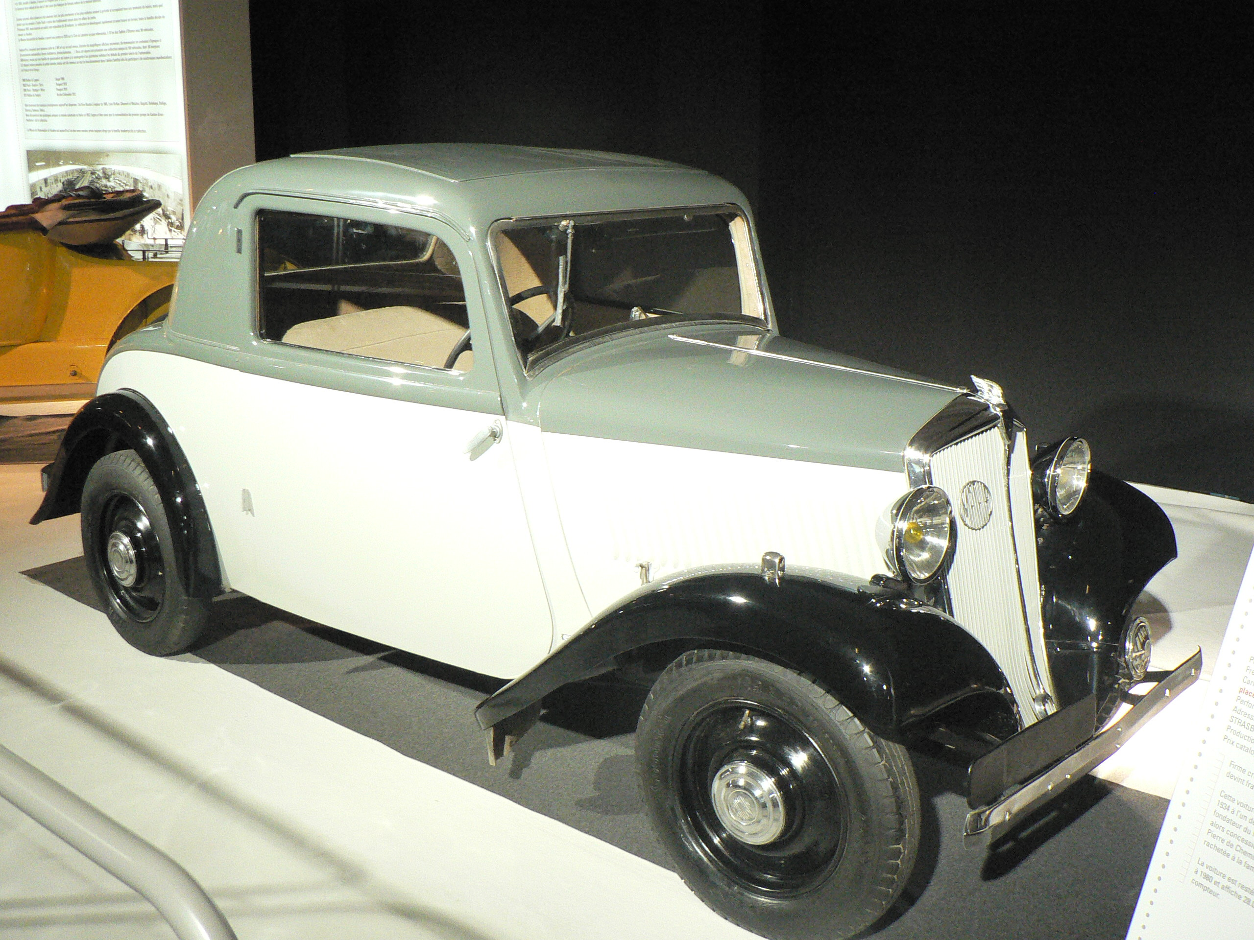 Mondial de l automobile de Paris (October 2006)